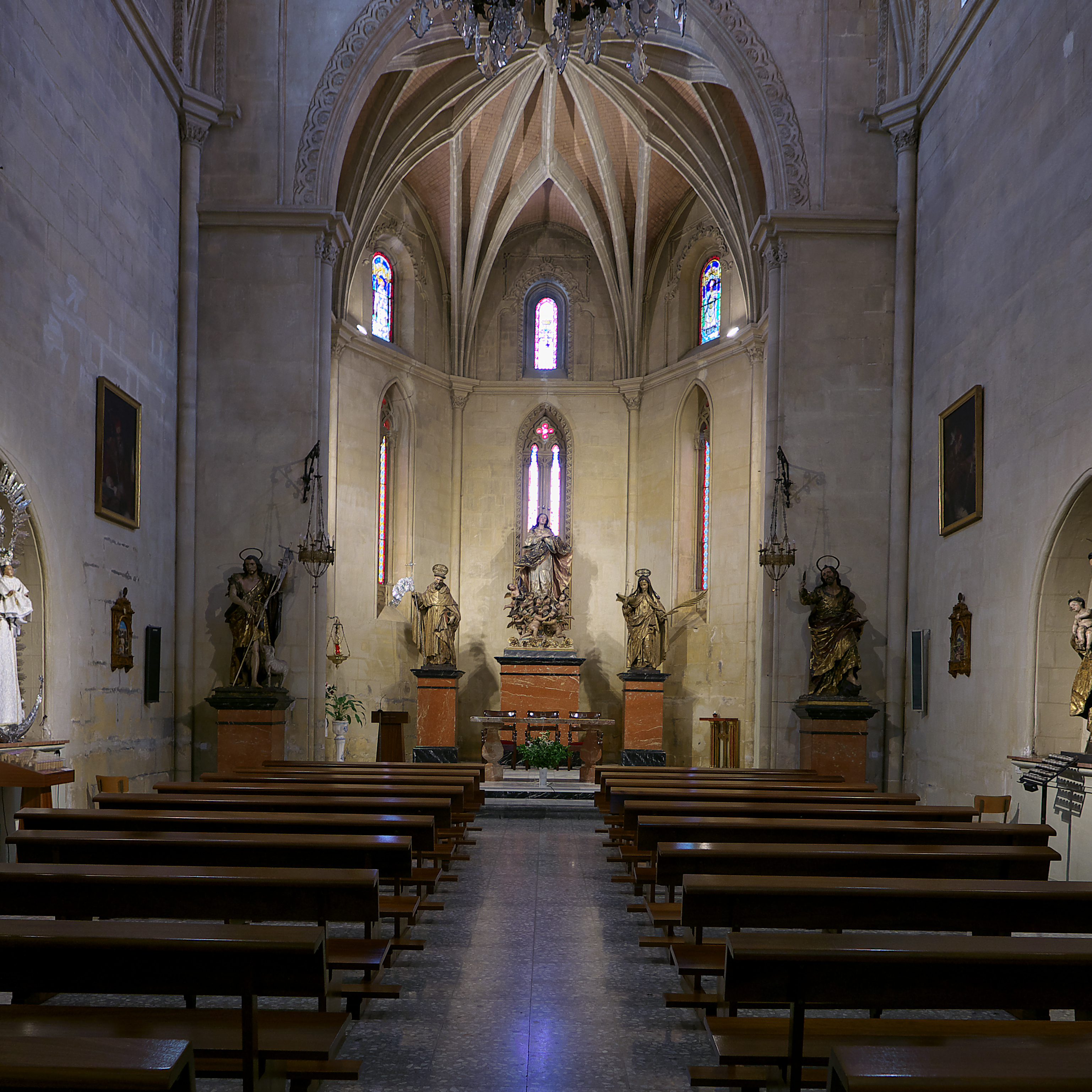 Iglesia conventual de una sola nave con cabecera ochavada, fundada con el título de Santiago de la Espada o Santiago de los Caballeros por Lorenzo Suárez de Figueroa (1405) para la Orden de Santiago. Antiguo (1250) Priorato de Santiago de la Espada, caballeros de la Orden Militar de Santiago.